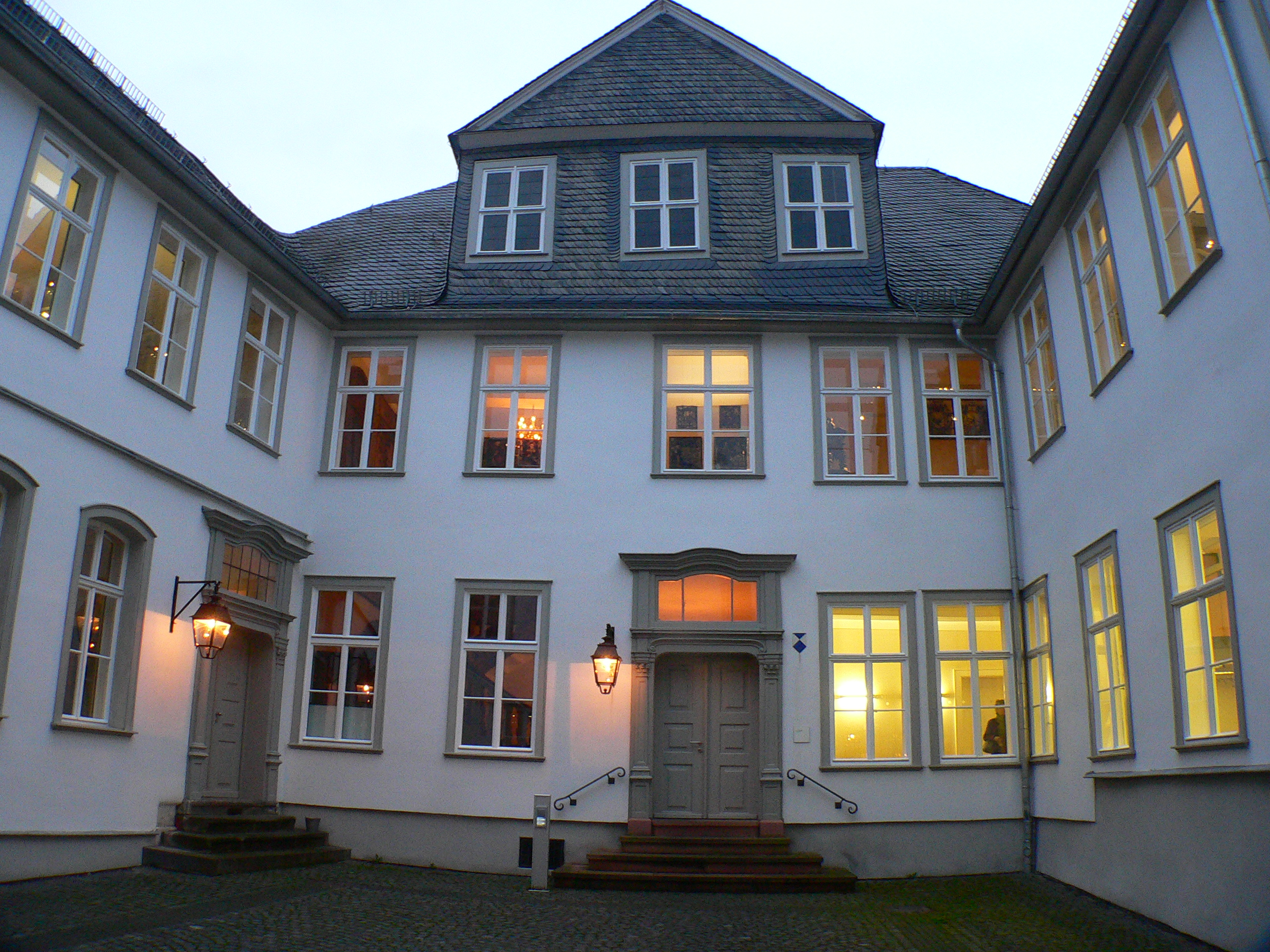 Palais Papius in Wetzlar, Deutschland, Hessen. Museum für Möbel des 17. bis 18. Jahrhunderts. Außenansicht des Innenhofes.